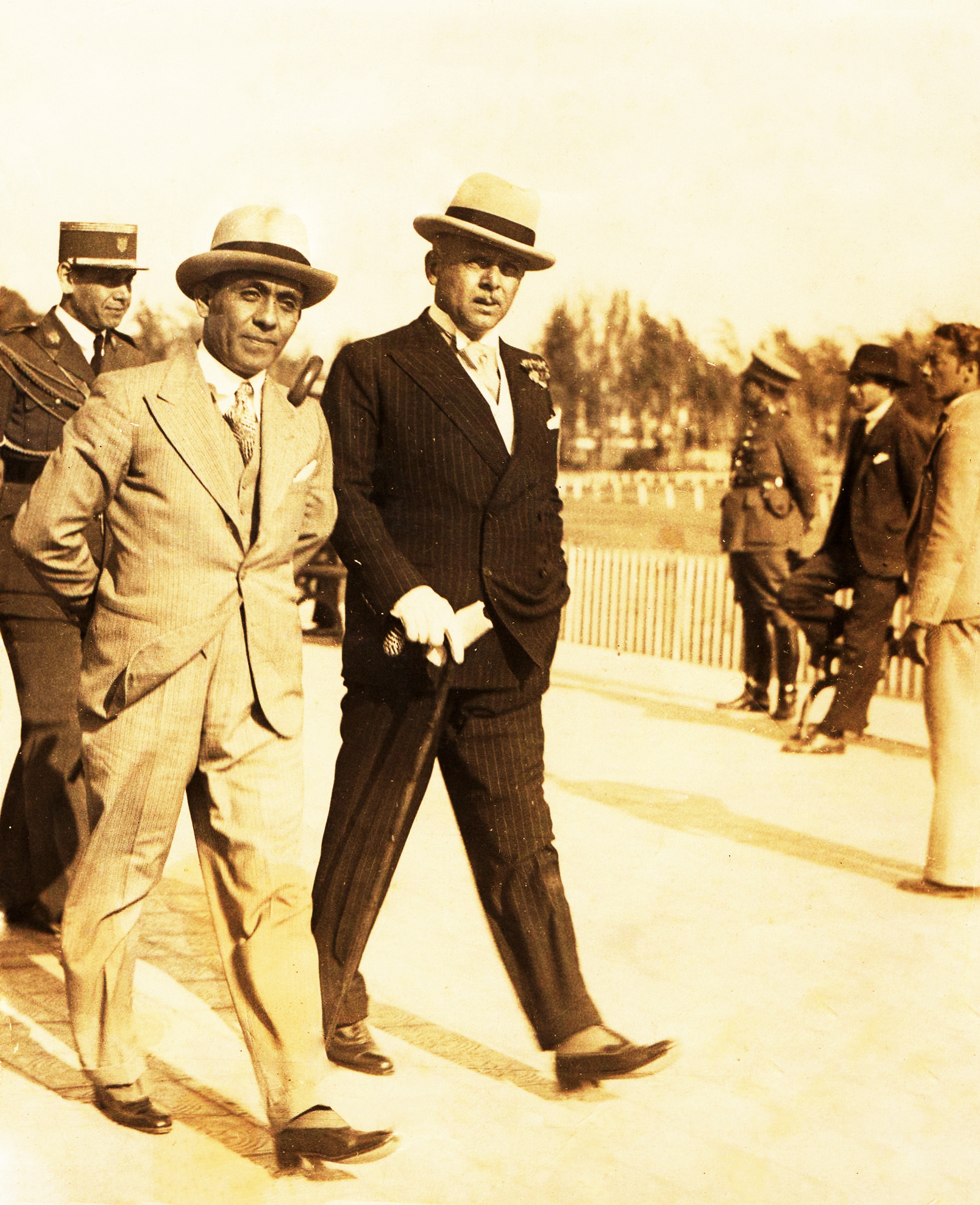 Luis Sanchez Cerro y el Economista Estadounidense Edwin W.Kemmerer. propuso la venida de la Misión presidida por Kemmerer para cooperar en la reforma monetaria y bancaria del perú.